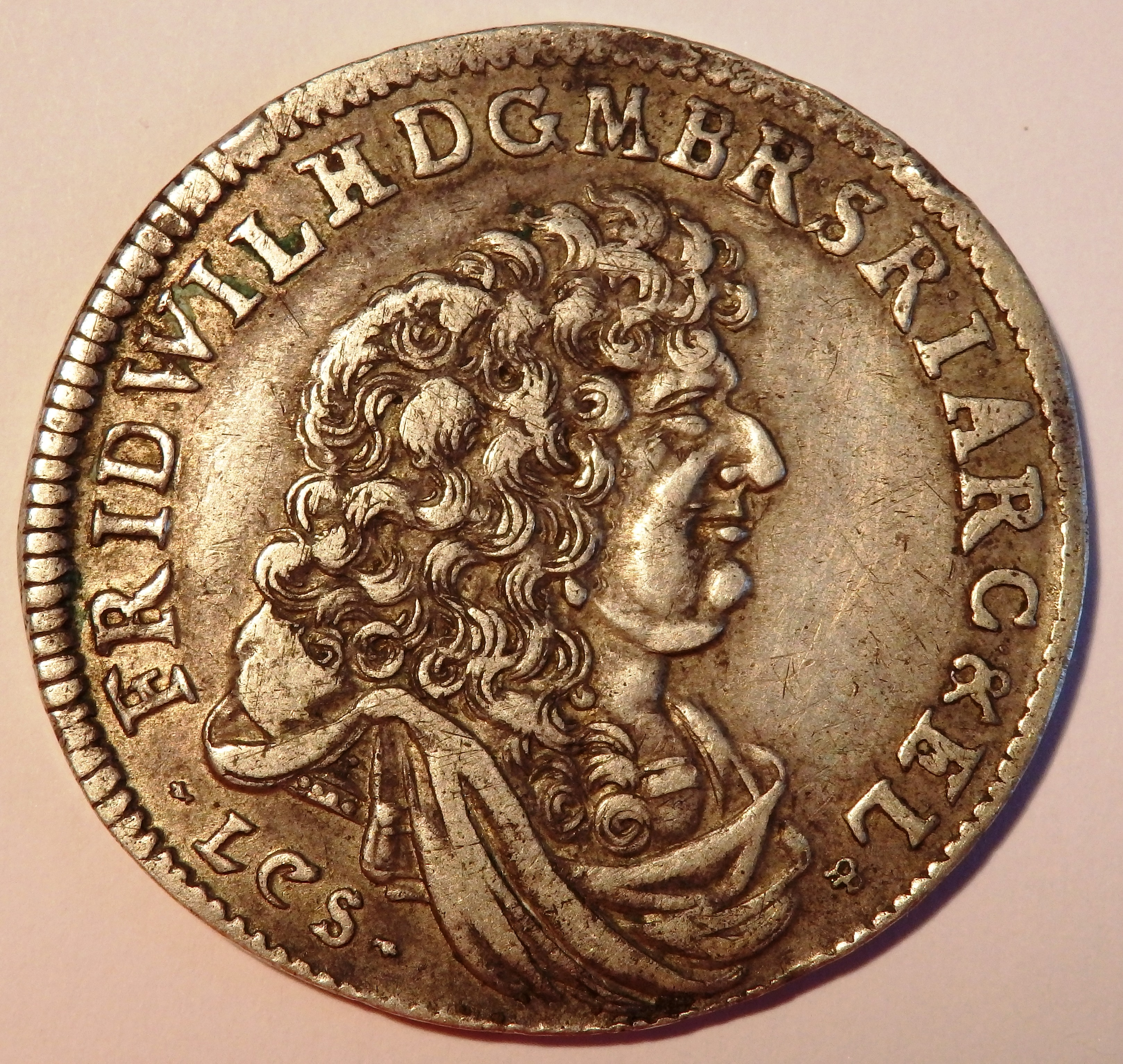 Friedrich Wilhelm, der "Große Kurfürst", auf Gulden (2/3 Taler) von 1683